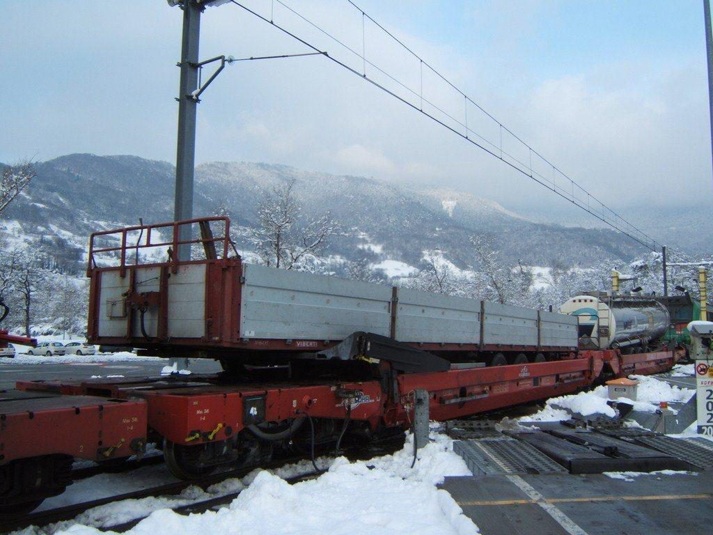 Système, train et wagon Modalohr, plateforme d'Aiton, Savoie, France